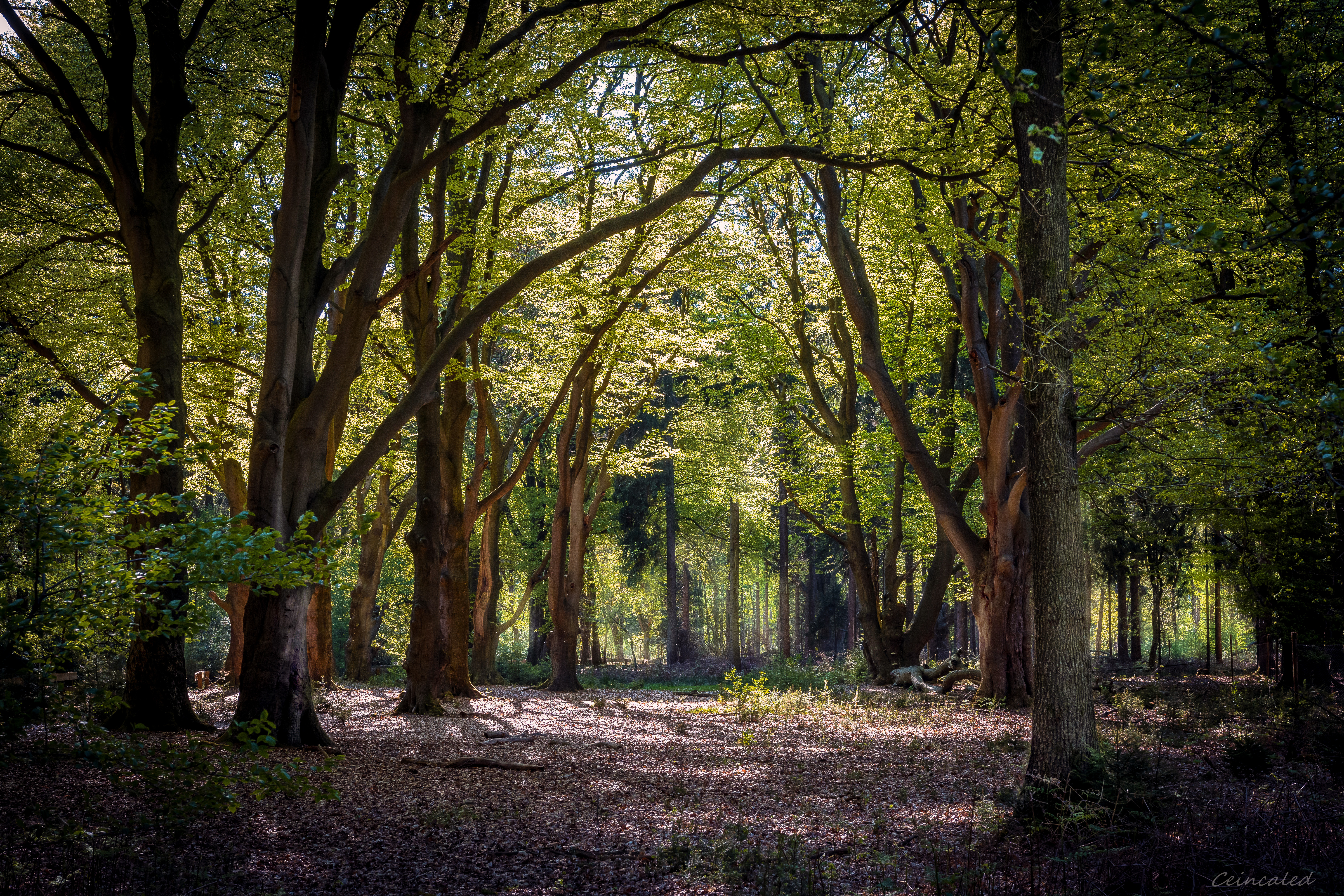 Das Foto zeigt das Tinner Loh im Emsland im Frühling